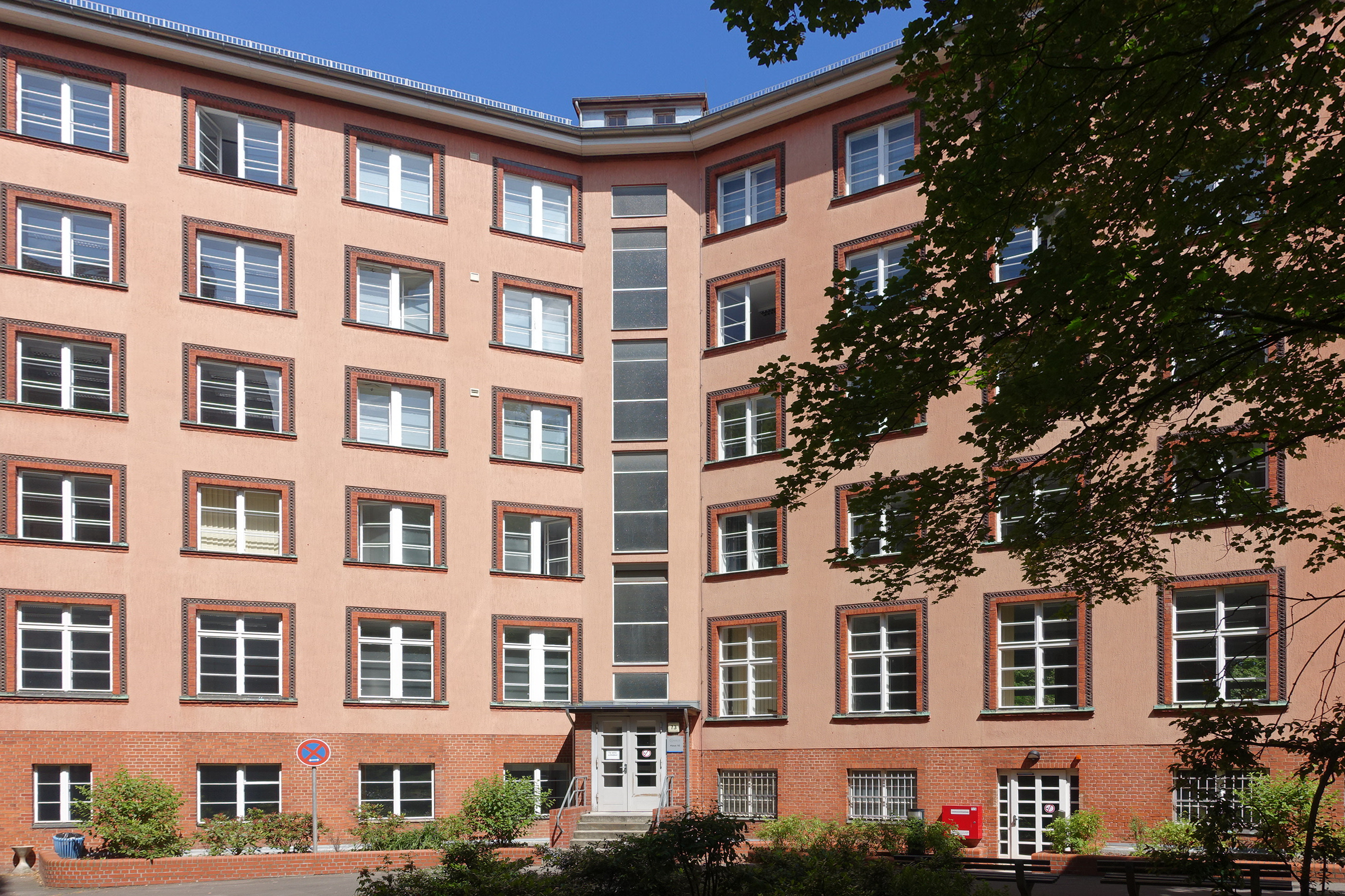 Krankenhausgebäude